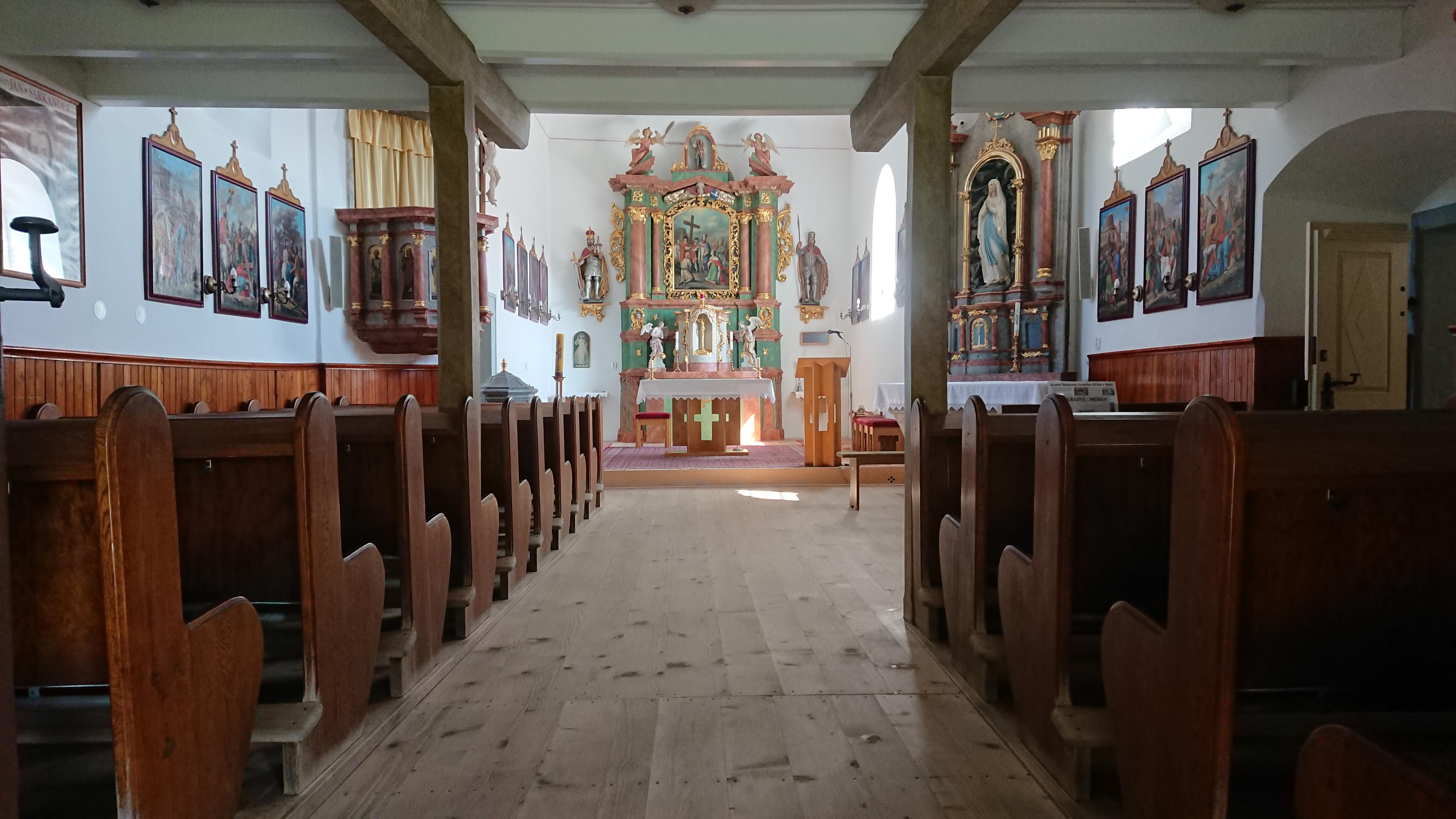 Interiér kostela Nalezení svatého Kříže v Rybí.